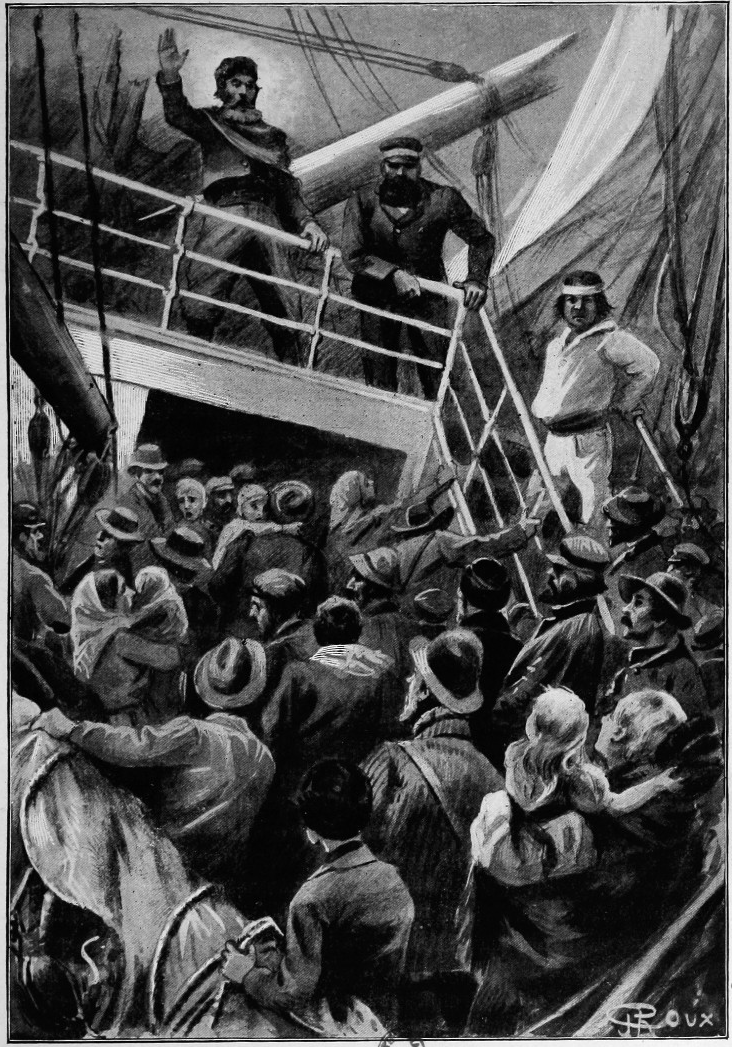 Illustration from Verne - Les Naufragés du Jonathan, Hetzel, 1909.djvu